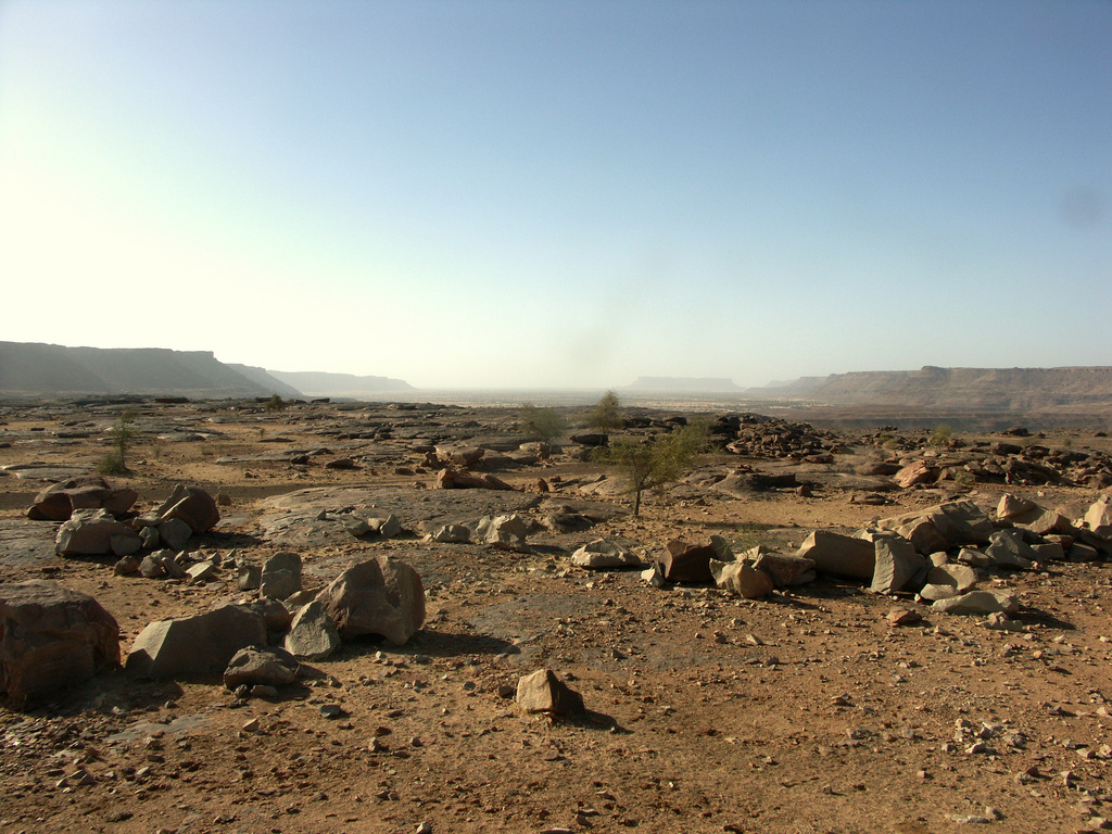 Passe de Djo�k, Tagant mountains, Mauritania.